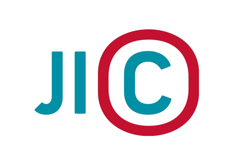 JIC vytváří prostředí pro inovační podnikání na jižní Moravě a podporuje vytváření a rozvoj firem, které mění svět.